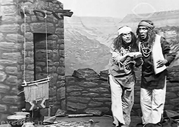 Robert G. Vignola (left).